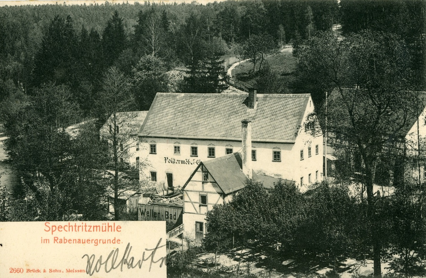 Rabenau; Spechtritzmühle im Rabenauer Grund This postcard is from publisher Brück & Sohn in Meißen ( This postcard has a unique number 02660 and is available in a higher resolution at the publisher. This images was uploaded in a cooperation project between Wikipedians and the publisher.